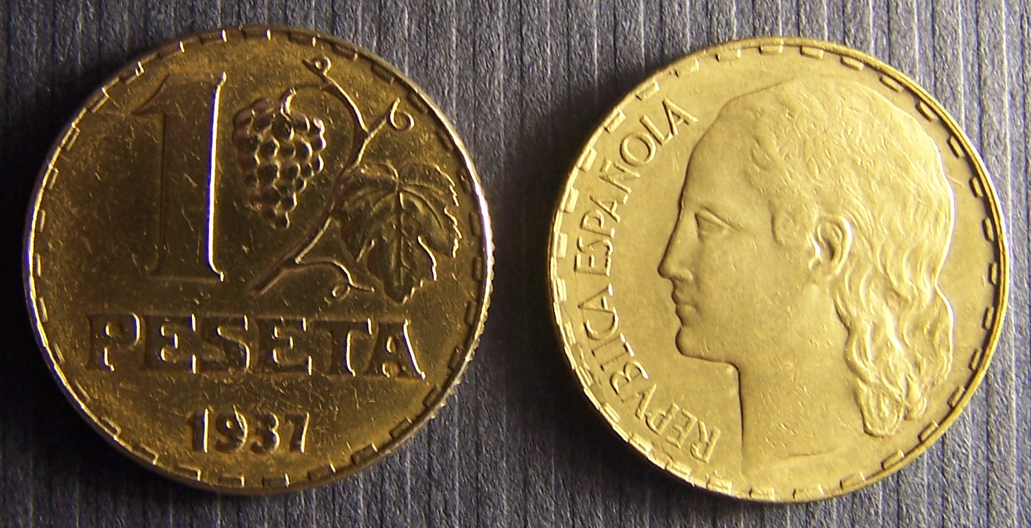 Anverso y reeverso de una moneda de una peseta de la II República Española de 1937